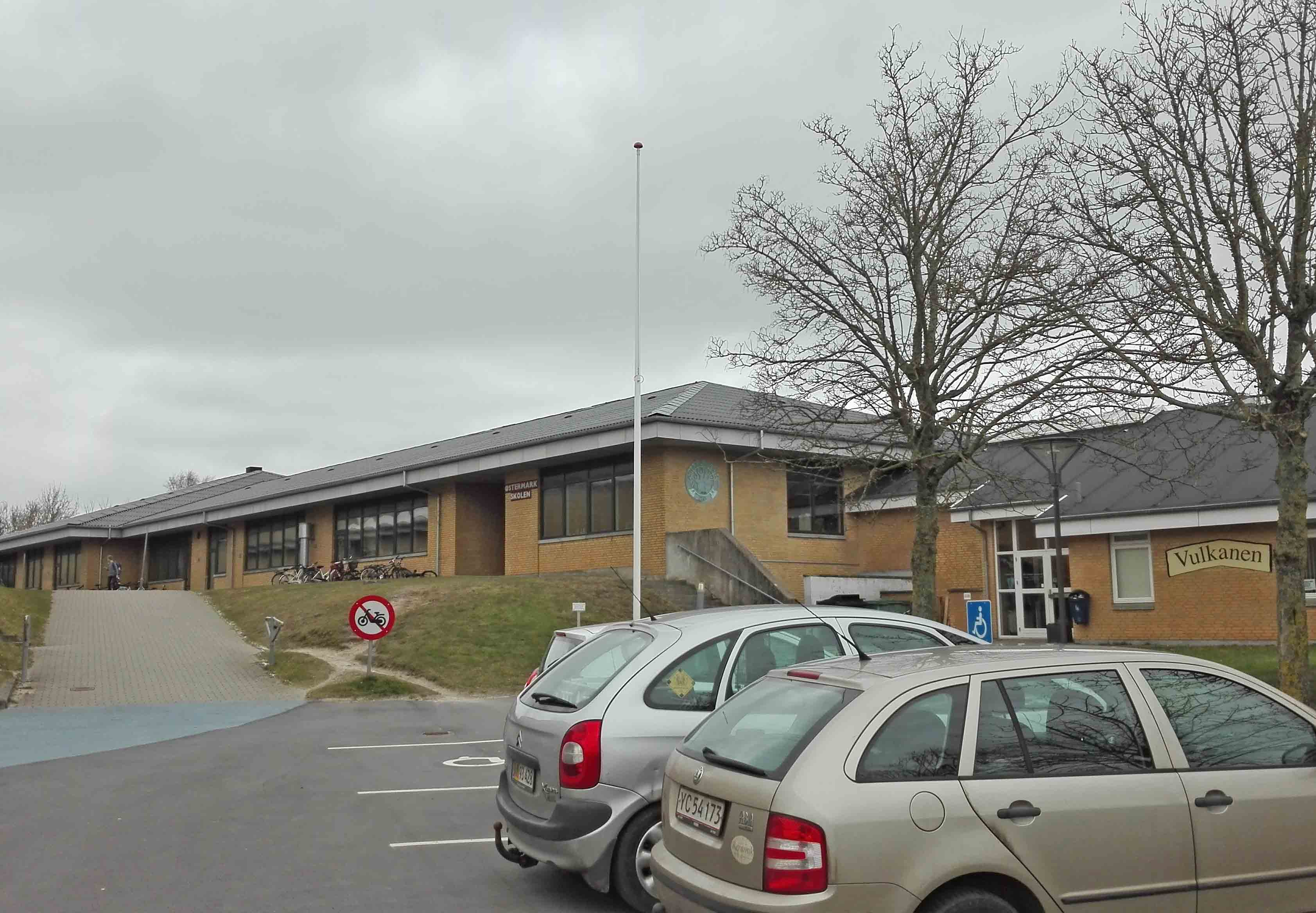 Østermarkskolen i Aars